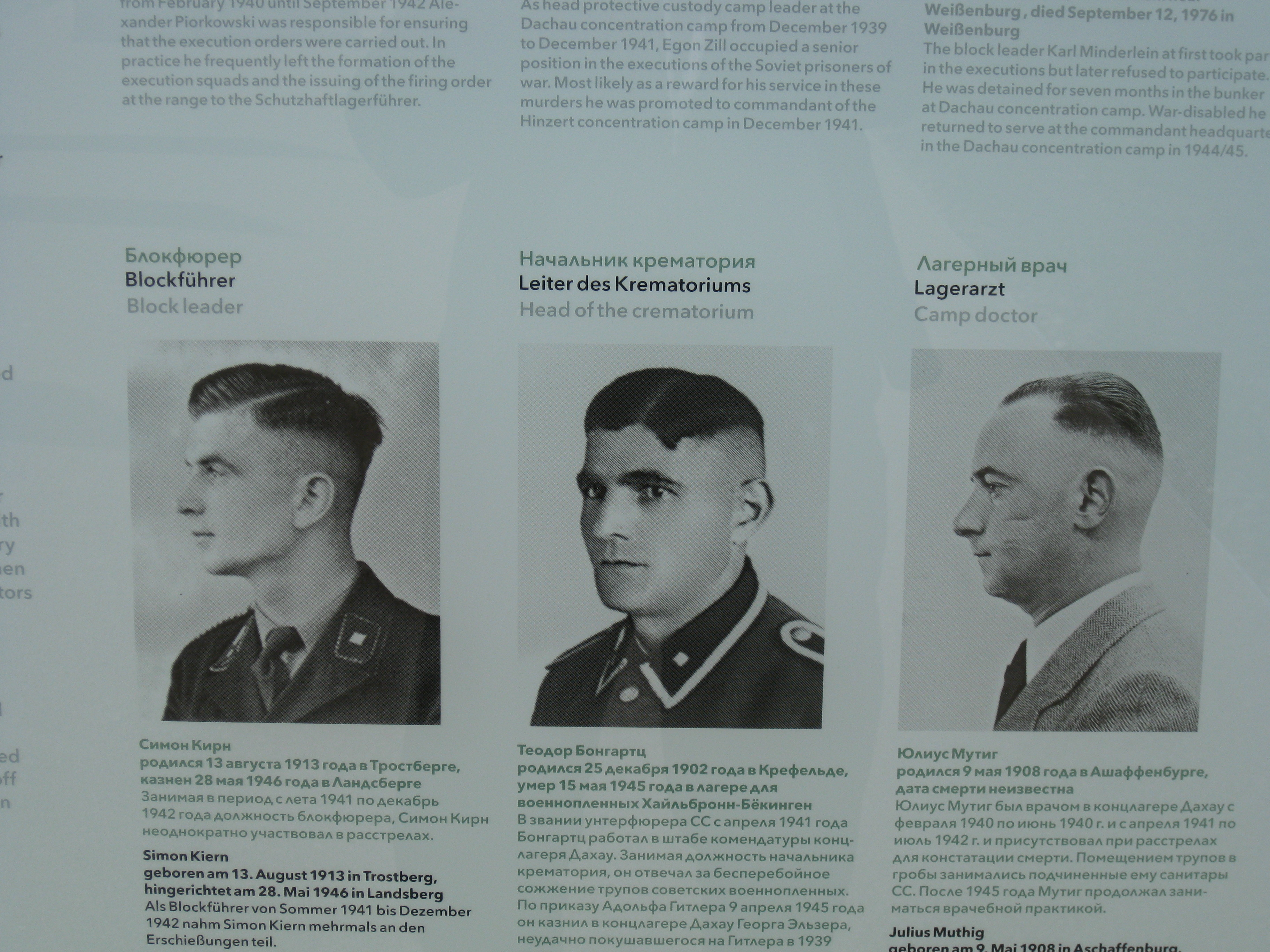 Schießplatz Hebertshausen